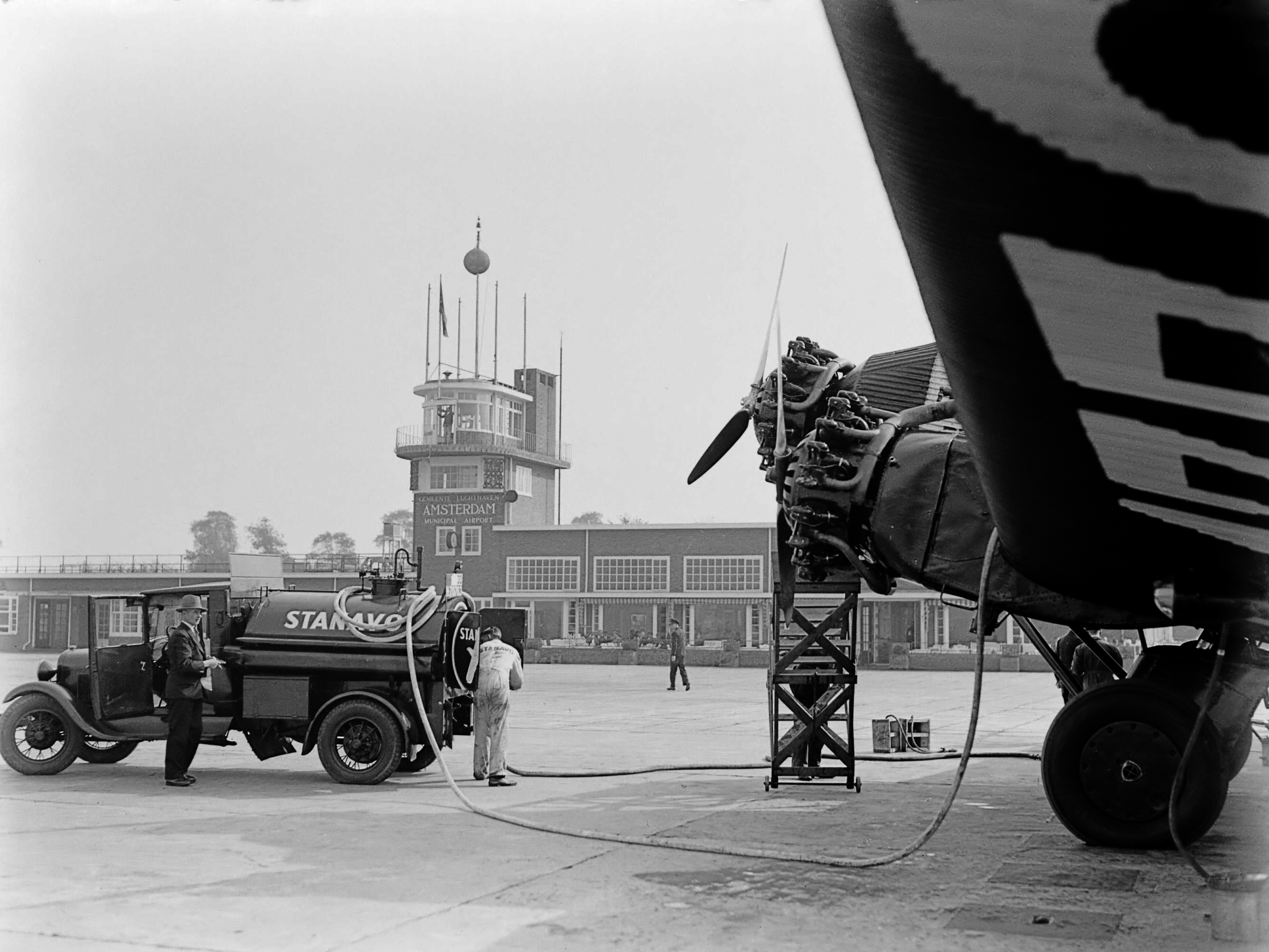 Een Junkers G31 wordt bijgetankt 1933